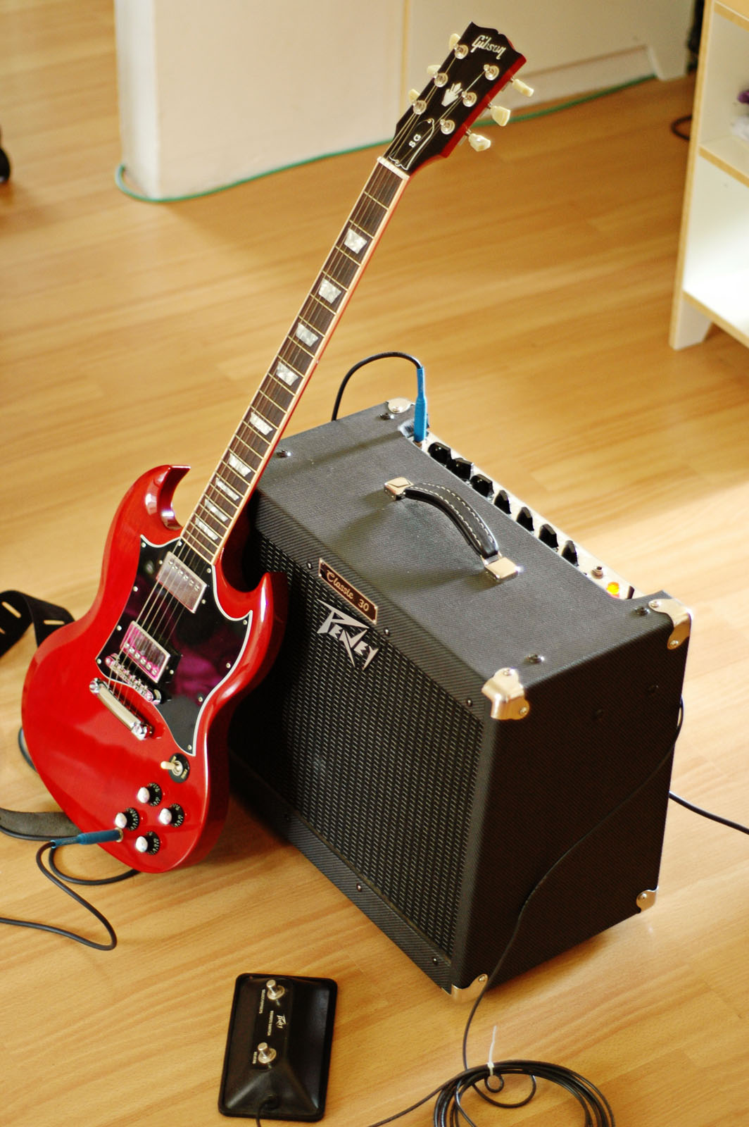 Gibson SG